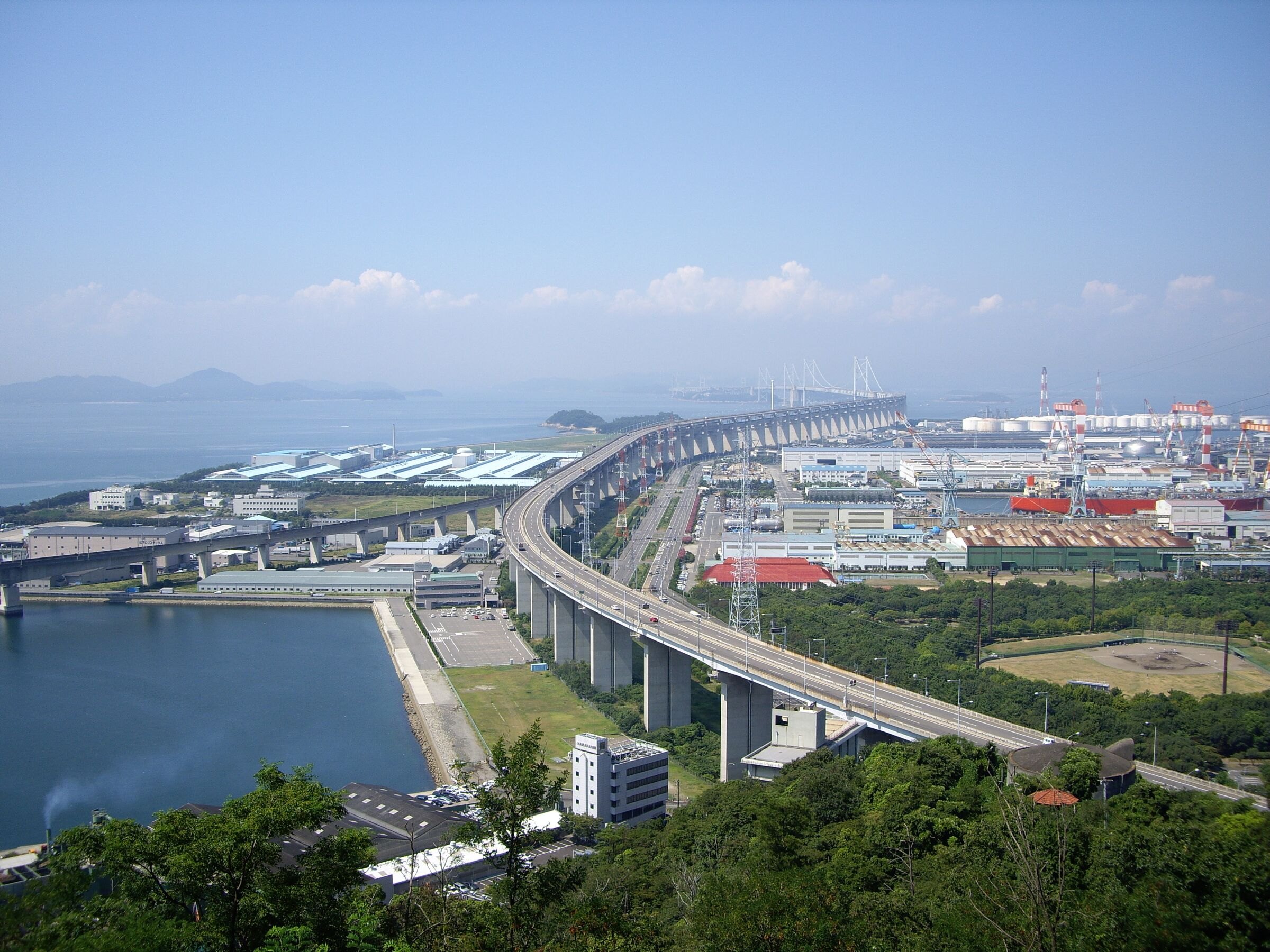 番の州高架橋（南備讃瀬戸大橋へと繋がる香川側陸上部分の橋脚）：右手より鉄道が高速道の下側へと合流し、鉄道併用橋である瀬戸大橋へと続く。また、高架橋の下には番の州工業地帯が広がる。 - 日本国香川県宇多津町の常盤公園より撮影